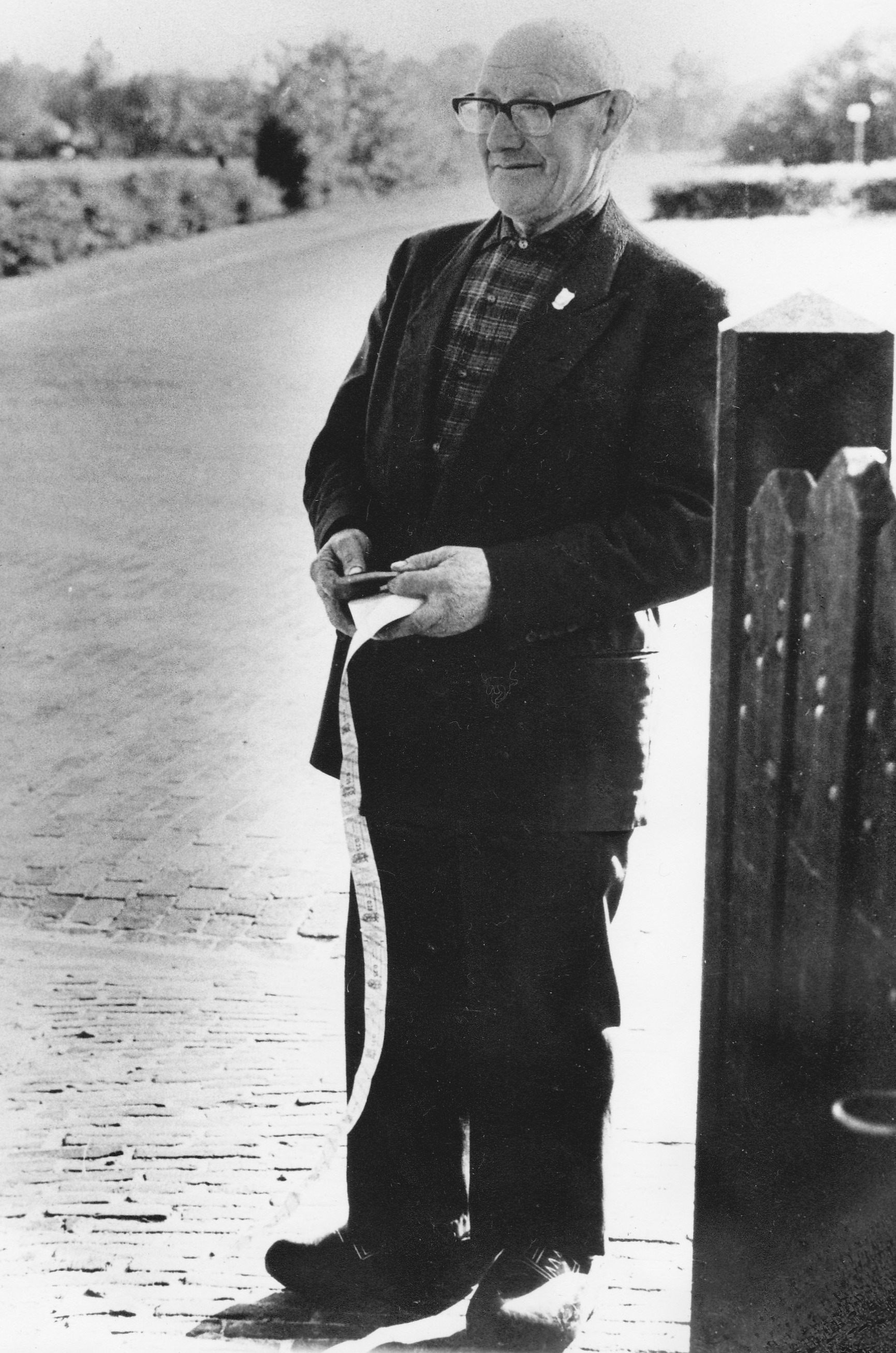 Dirk Stoel uit Schoorl verkocht van 1935 tot 1985 de entreebewijzen aan de poort.